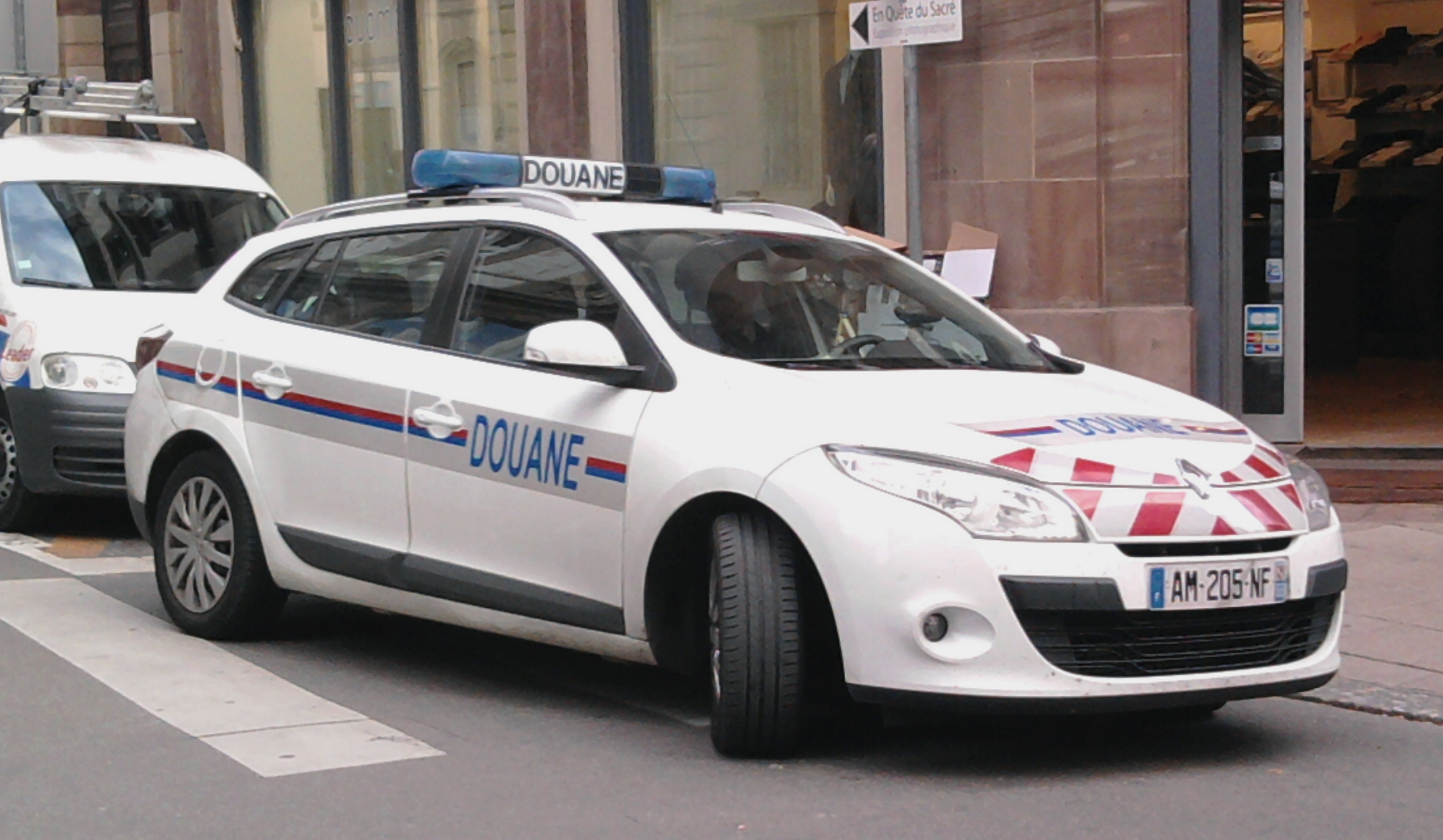 Mégane de la Douane française, Strasbourg